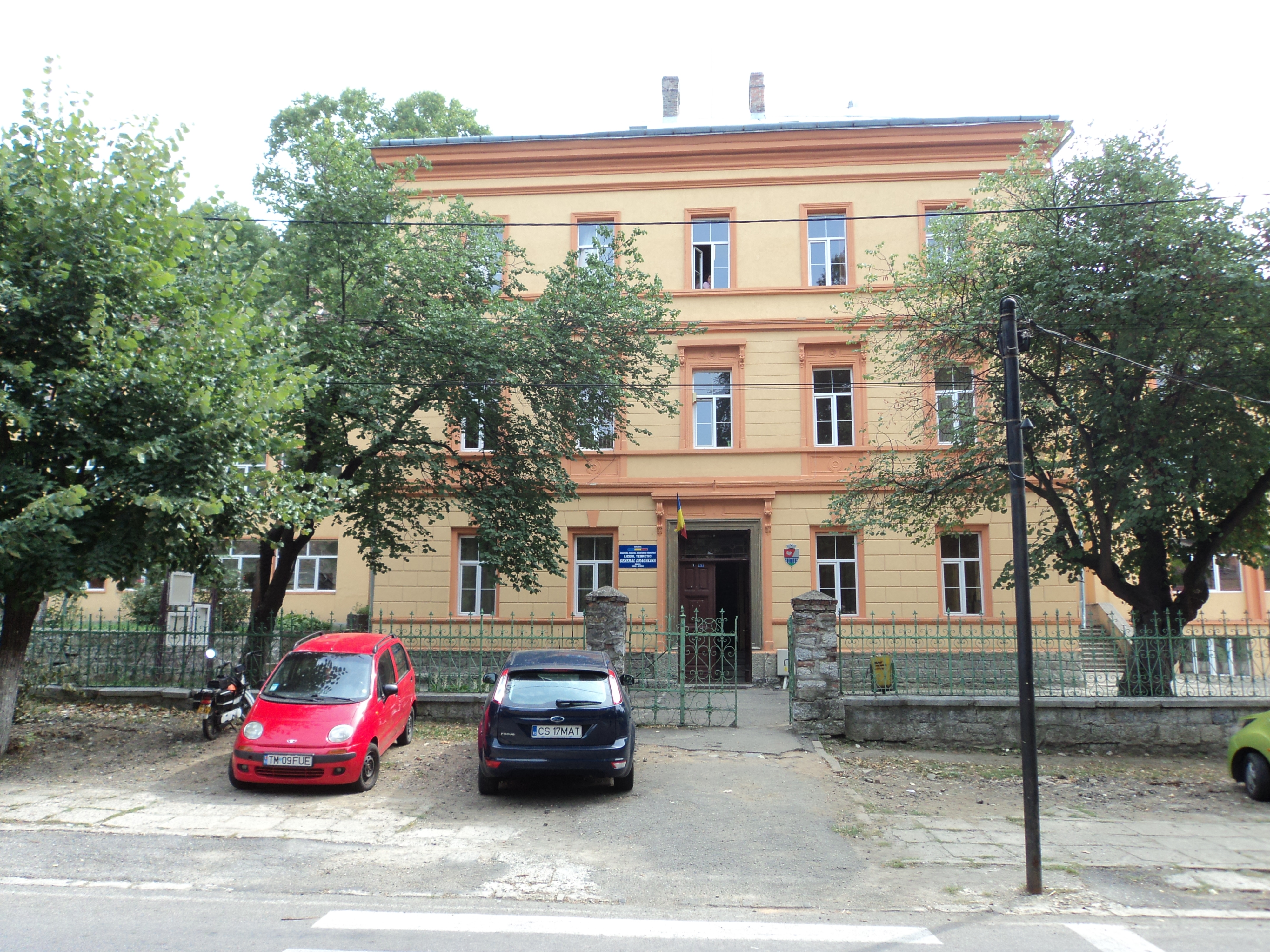 Școala Normală, azi Liceul "Ion Dragalina"; corpul central - A. Piața Ferdinand nr. 1, Oravița